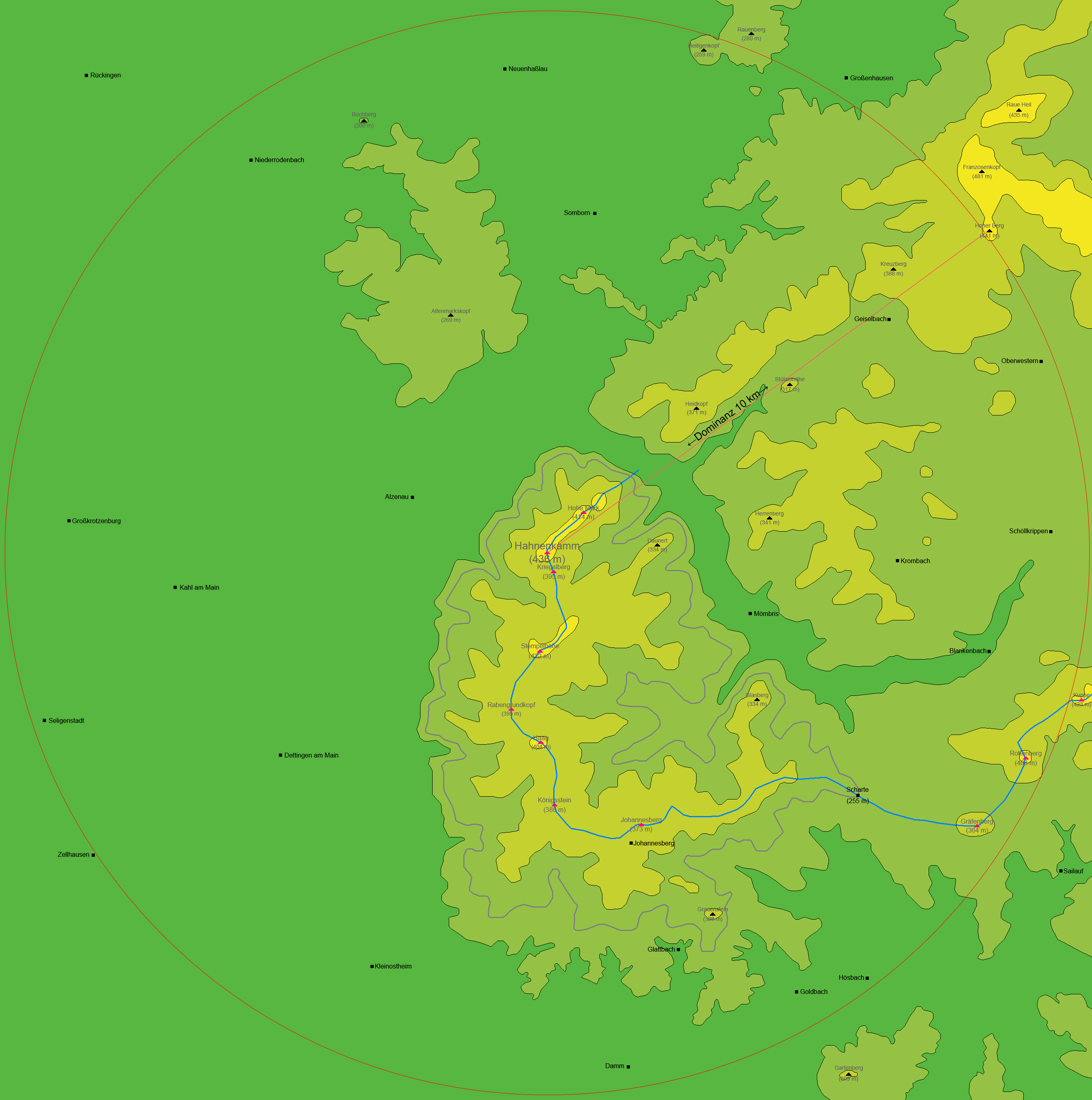 Topographische Karte des Hahnenkamms mit Dominanz, Kammverlauf und niedrigster geschlossener Höhenlinie Höhen über 400 m Höhen über 300 m Höhen über 200 m Höhen über 100 m Längsschnitt entlang des Bergkamms Niedrigste geschlossene Höhenlinie Dominanz